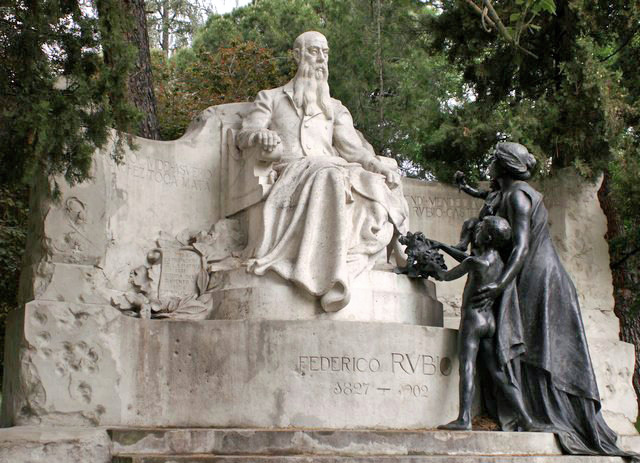 Monumento a Federico Rubio, en el Parque del Oeste, en el Paseo de Camoens, Madrid.